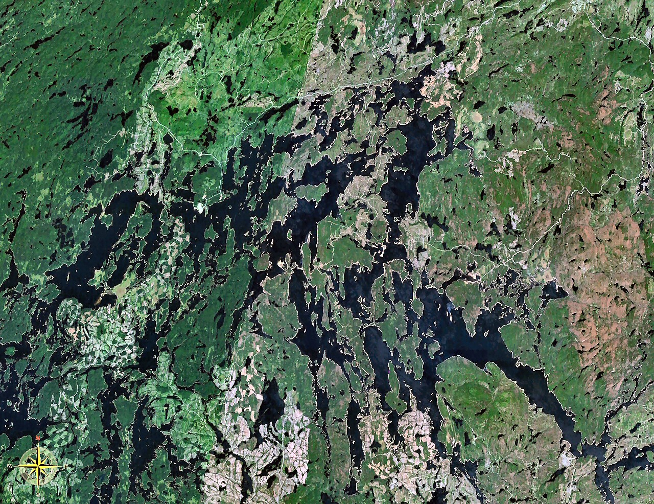 Gouin Reservoir, Quebec, Canada